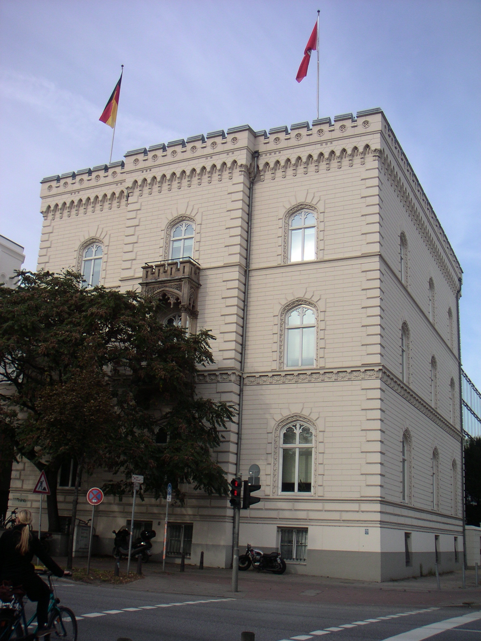 Hamburg, Alsterglacis Ecke Warburgstraße